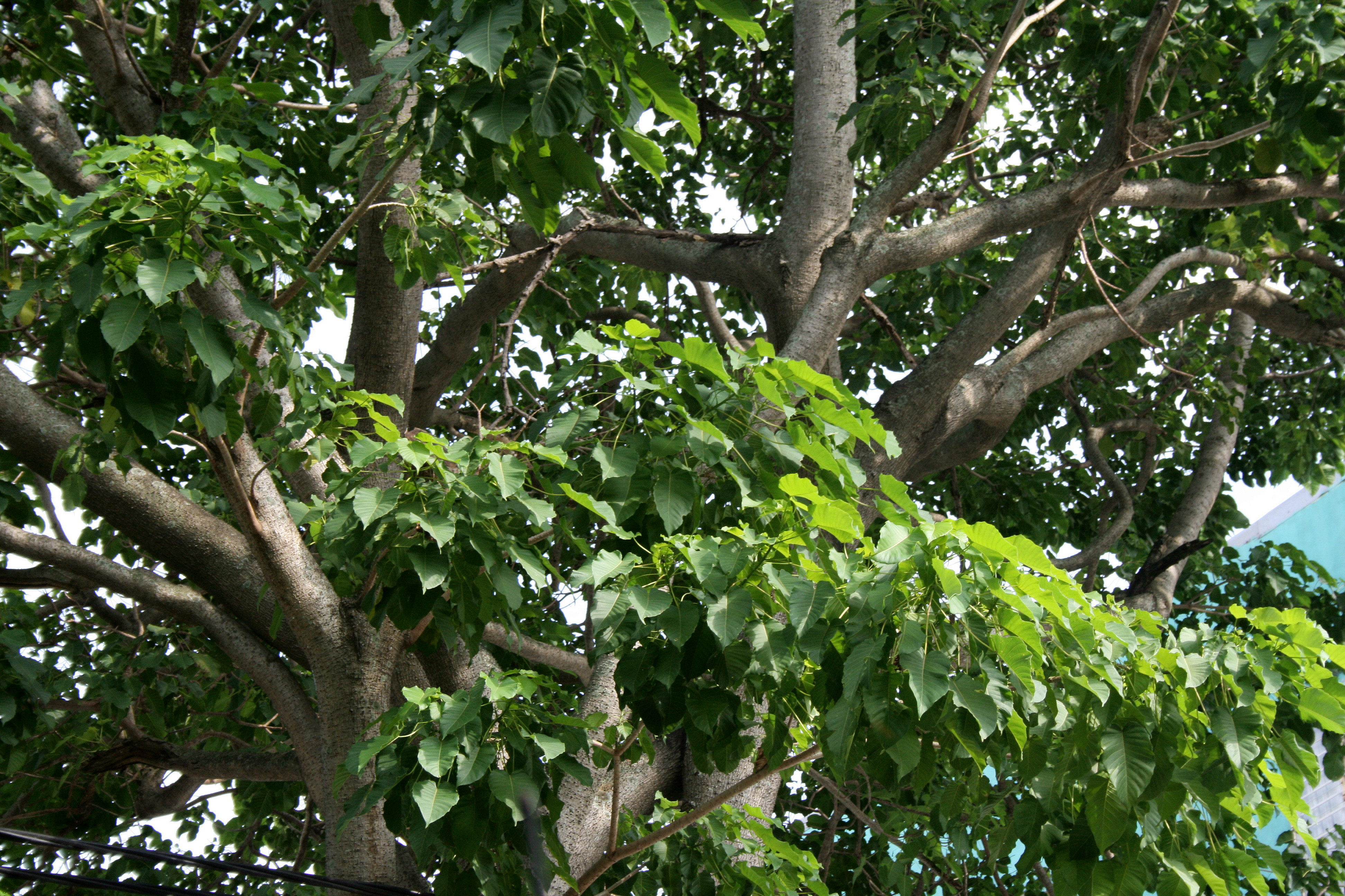 Hura crepitans (Cây Vông đồng) tree in Vietnam (non-native).